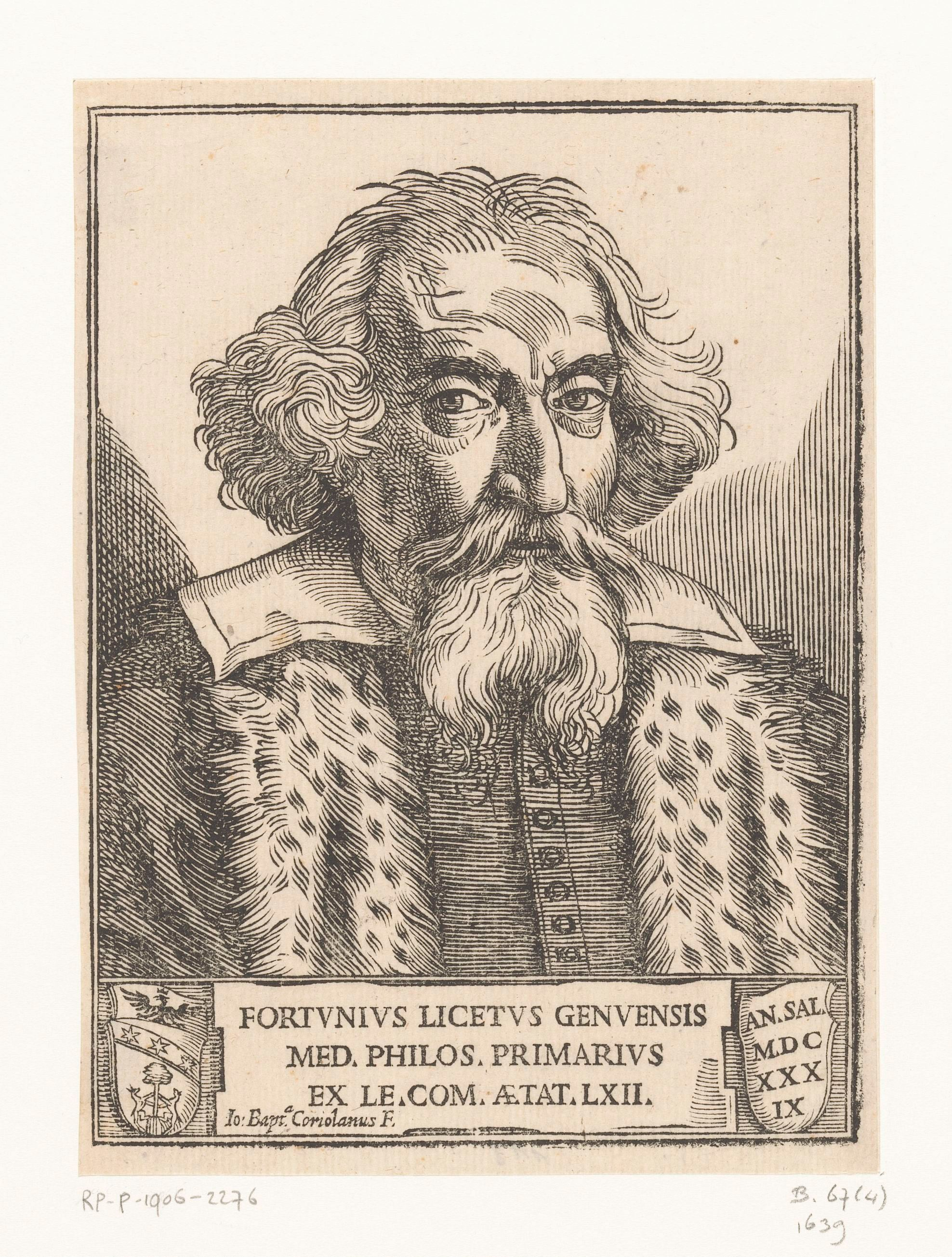 IdentificatieTitel(s): Portret van wetenschapper Fortunio LicetiFortunius Licetus Genuensis (titel op object)Objecttype: prent Objectnummer: RP-P-1906-2276Catalogusreferentie: The Illustrated Bartsch 4Bartsch 4Opschriften / Merken: verzamelaarsmerk, verso, gestempeld: Lugt 2228Omschrijving: Linksonder een wapenschild. Titel midden onder in een cartouche.VervaardigingVervaardiger: prentmaker: Giovanni Battista Coriolano (vermeld op object)Plaats vervaardiging: ItaliëDatering: 1639Fysieke kenmerken: houtsnedeMateriaal: papier Techniek: houtsnedeAfmetingen: blad: h 172 mm × b 127 mmOnderwerpWat: historical person (FORTUNIUS LICETUS) - historical person (FORTUNIUS LICETUS) portrayed alonehistorical personsWie: Fortunio LicetiVerwerving en rechtenCredit line: Aankoop met steun van de Vereniging RembrandtVerwerving: aankoop 11-mei-1906Copyright: Publiek domein